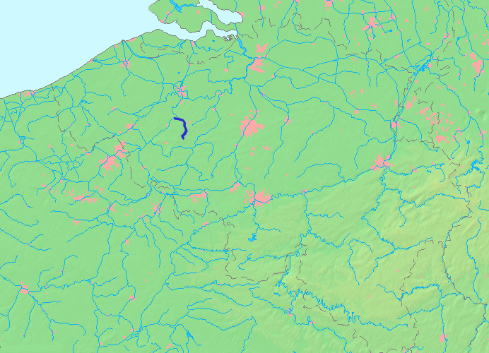 Kaart van de Zwalm op basis van Wikimedia Commons kaart MapBelgiumWater